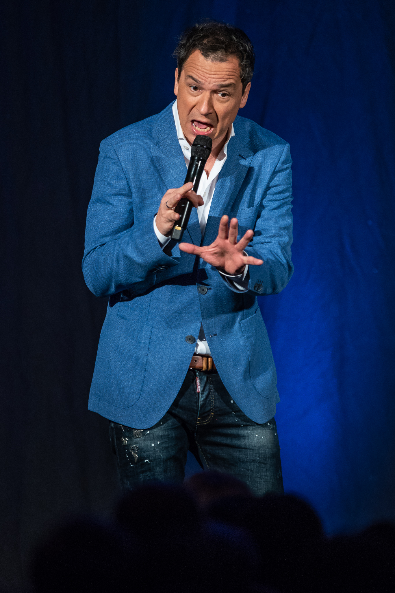 Comedy,Concertbüro Franken,Gutmann am Dutzendteich,Livecomedy,Stephan Bauer